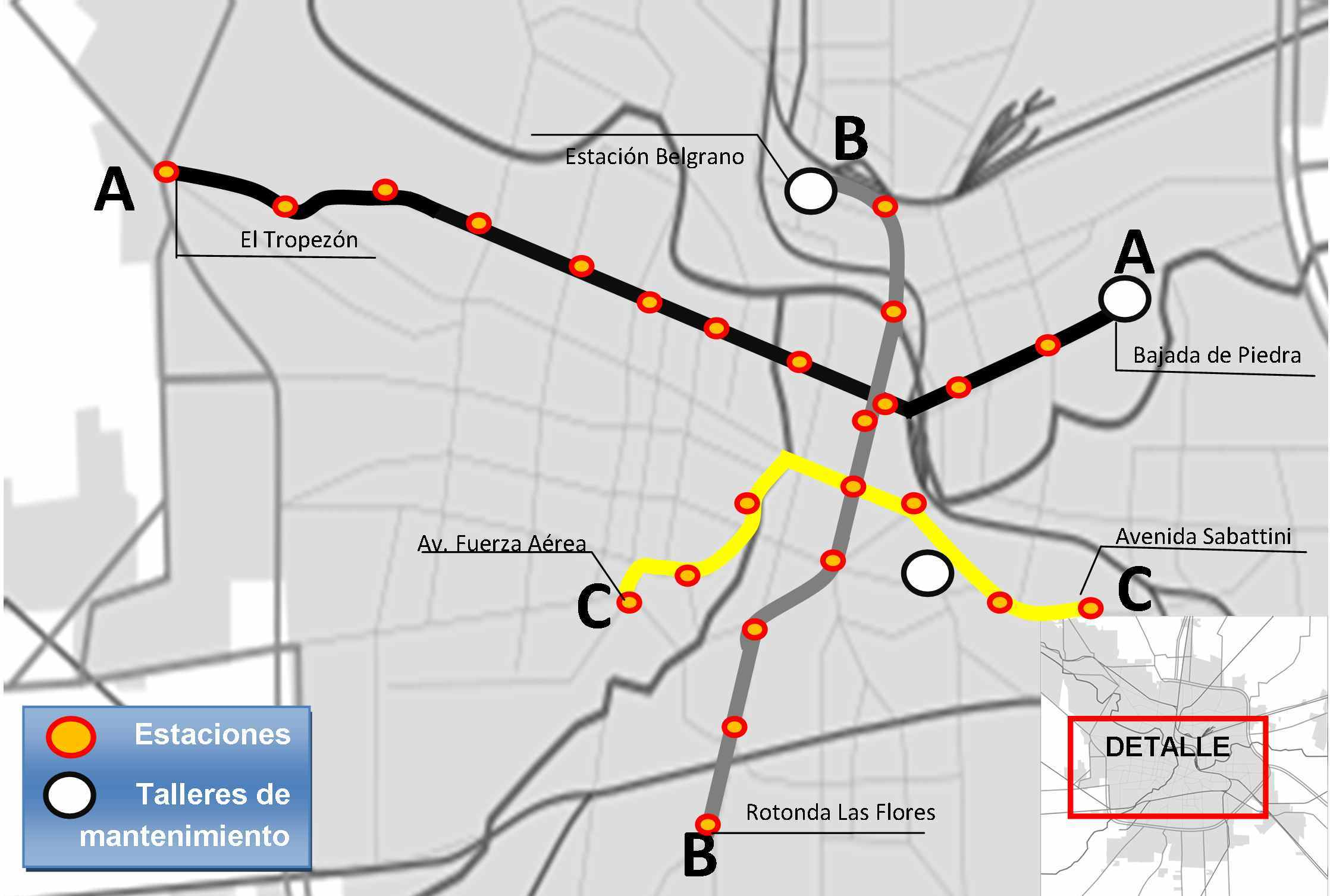 Nuevo trazado del Subte de Córdoba